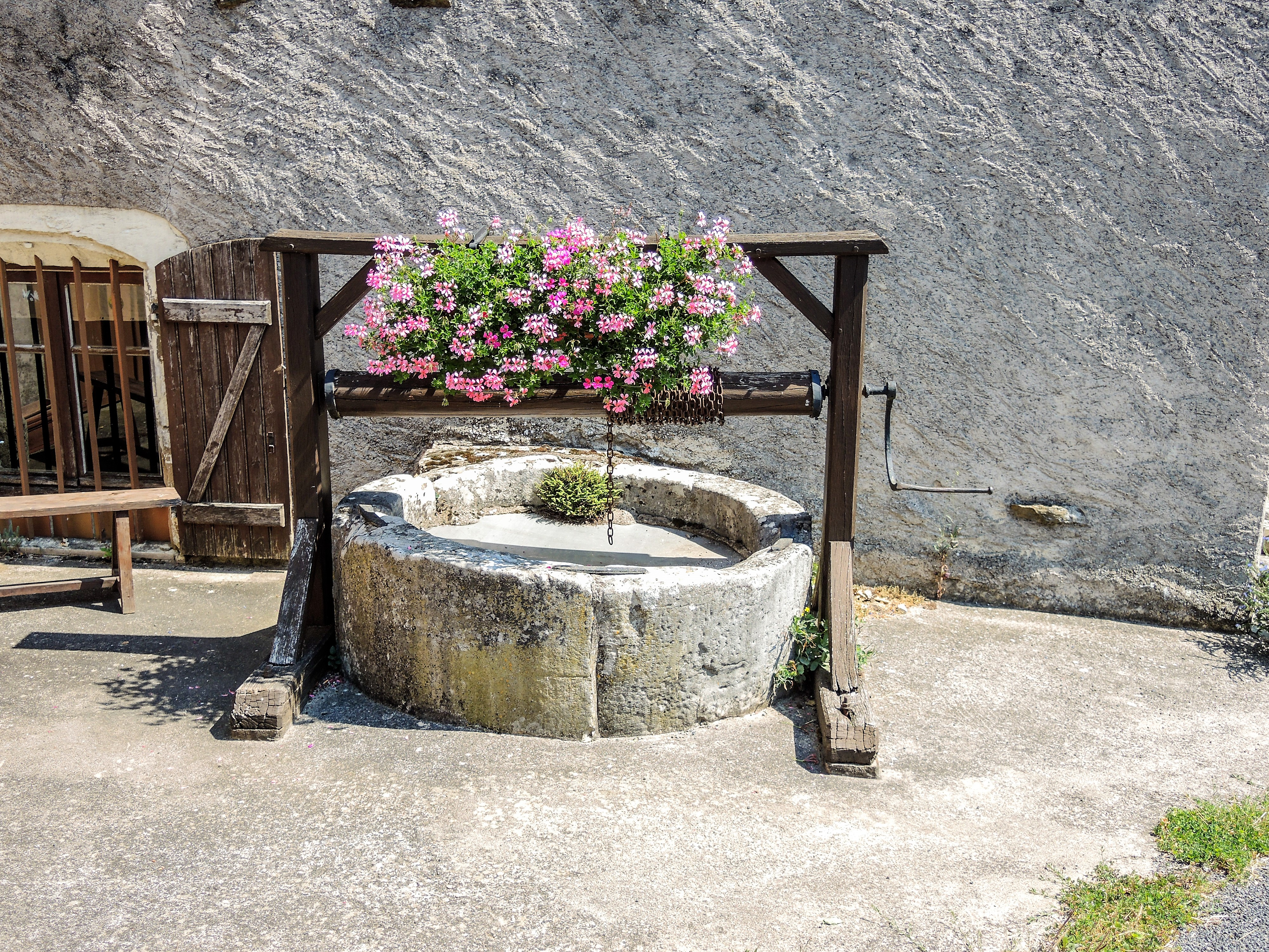 Troisième ancien puits. Rue du puits, Vaudémont. Meurthe-et-Moselle